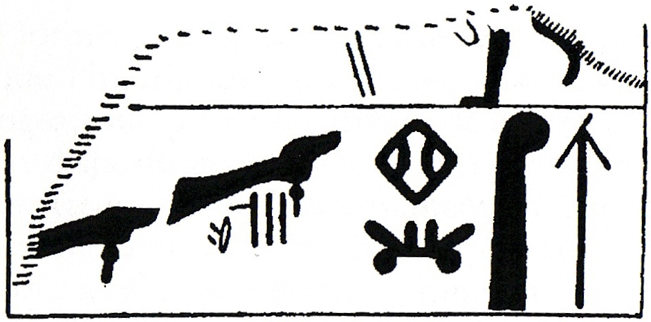 Abzeichnung einer Hieroglyphen-Luwischen Inschrift aus Beyköy, Türkei